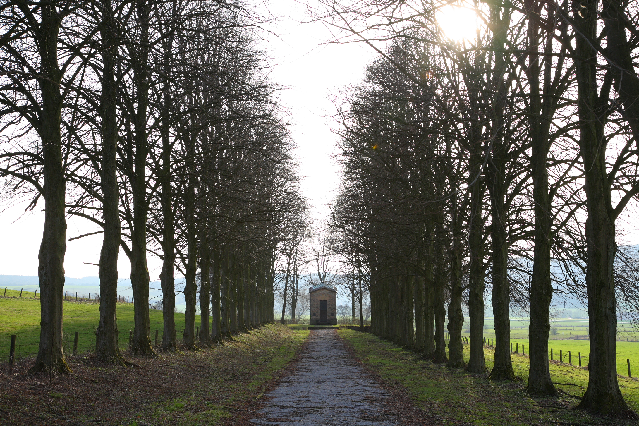 Das Rommenhöller-Denkmal ist eine 1932 eingeweihte Denkmalanlage zu Ehren des Unternehmers Carl Gustav Rommenhöller am südlichen Ortsrand des Bad Driburger Stadtteils Herste.